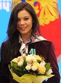 Орденом Дружбы награждена олимпийская чемпионка и бронзовый призёр Олимпийских игр в фигурном катании Елена Ильиных.